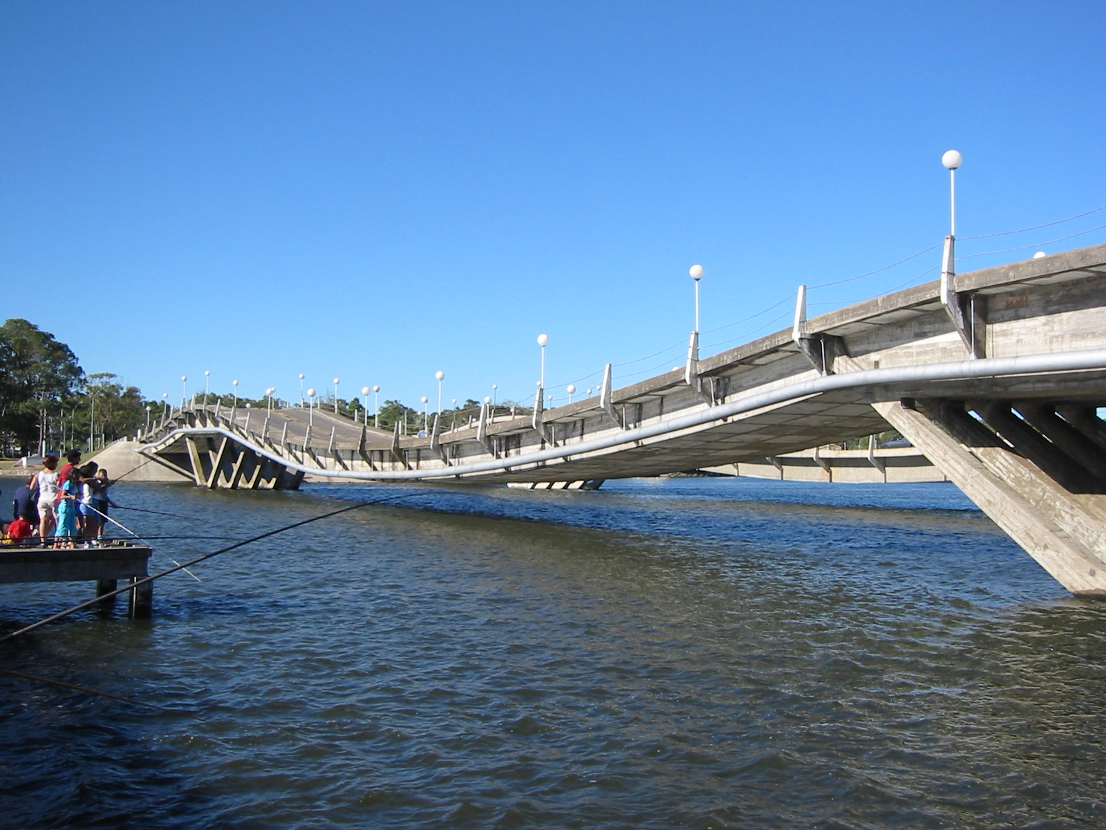 Puente de La Barra de Maldonado in Maldonado, Uruguay. It is a Stressed ribbon bridge